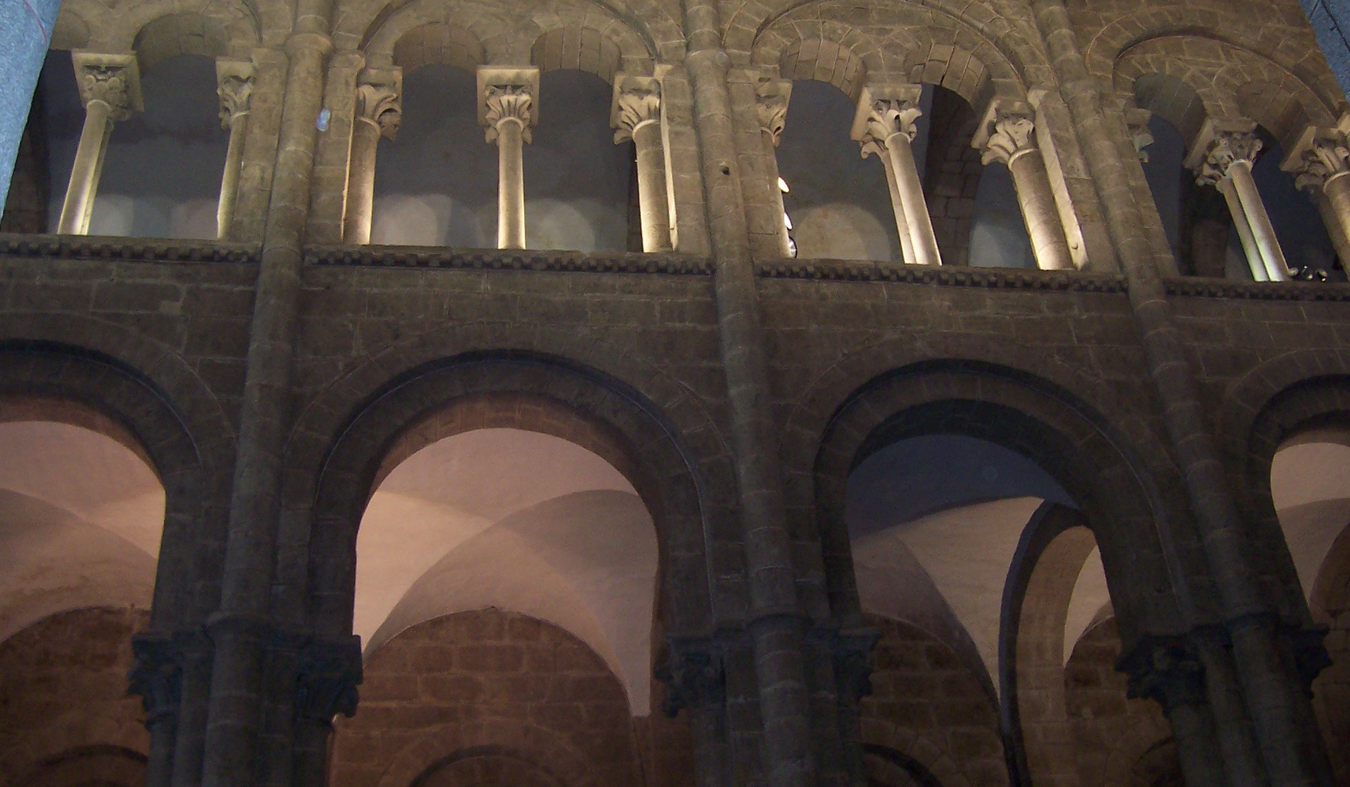 Catedral de Santiago